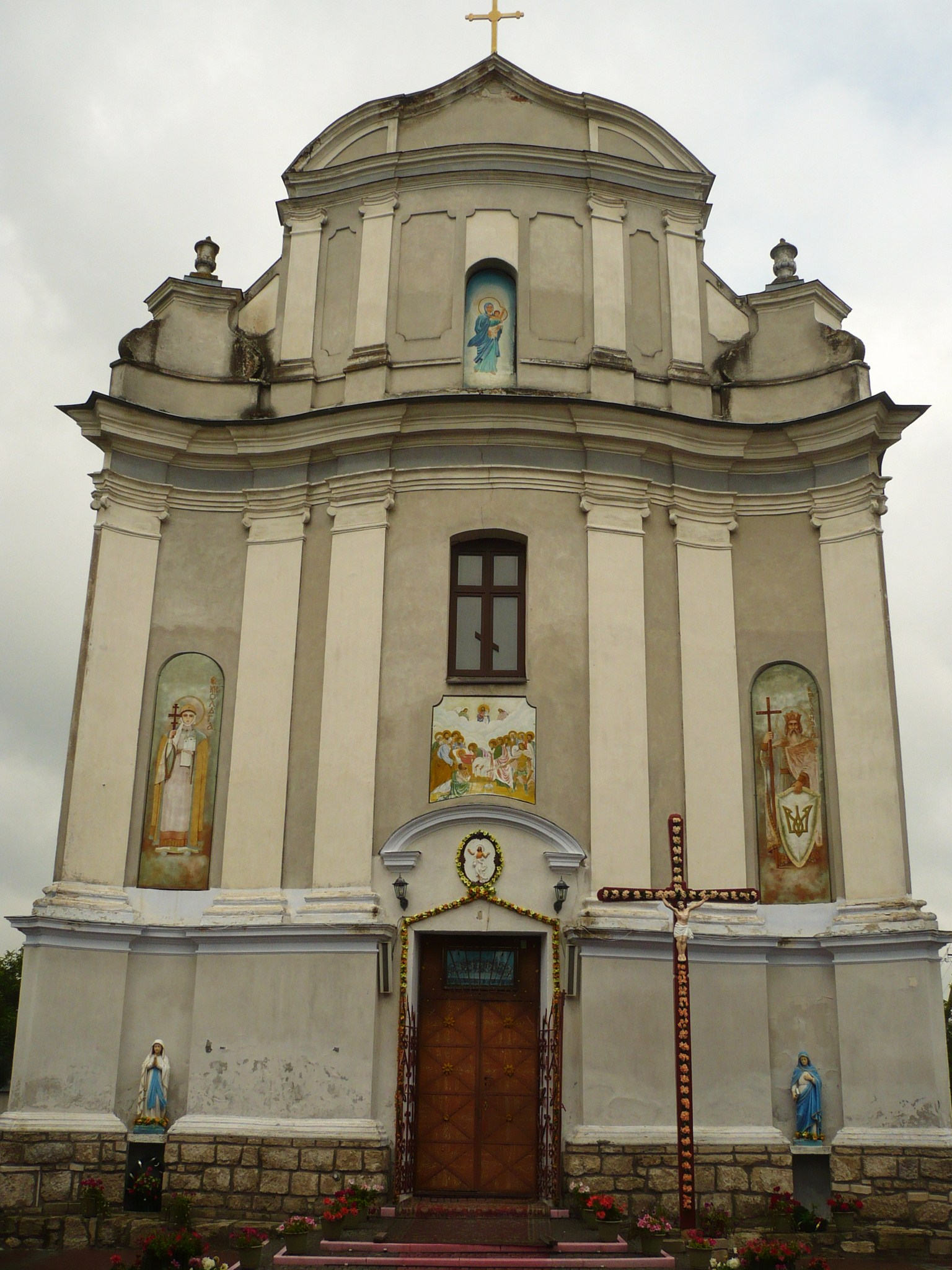 Zbaraż, kościół